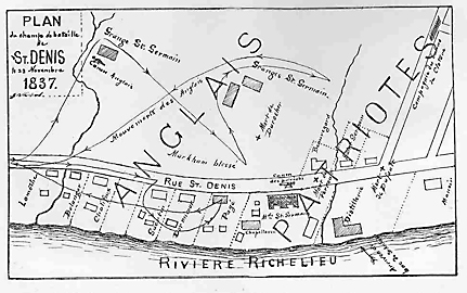 Plan de la bataille du 23 novembre 1837 à Saint-Denis-sur-Richelieu. Source: ALLAIRE, J.-B.-A., Histoire de la paroisse de Saint-Denis-sur-Richelieu, 1905, Collection de livres SHPS inc. Copier de